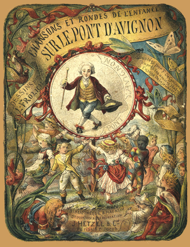 SUR LE PONT D'AVIGNON adaptees par F. de Gramon. (Strasbourg): Bibliotheque d'education et de recreation / J. Hetzel (1883)